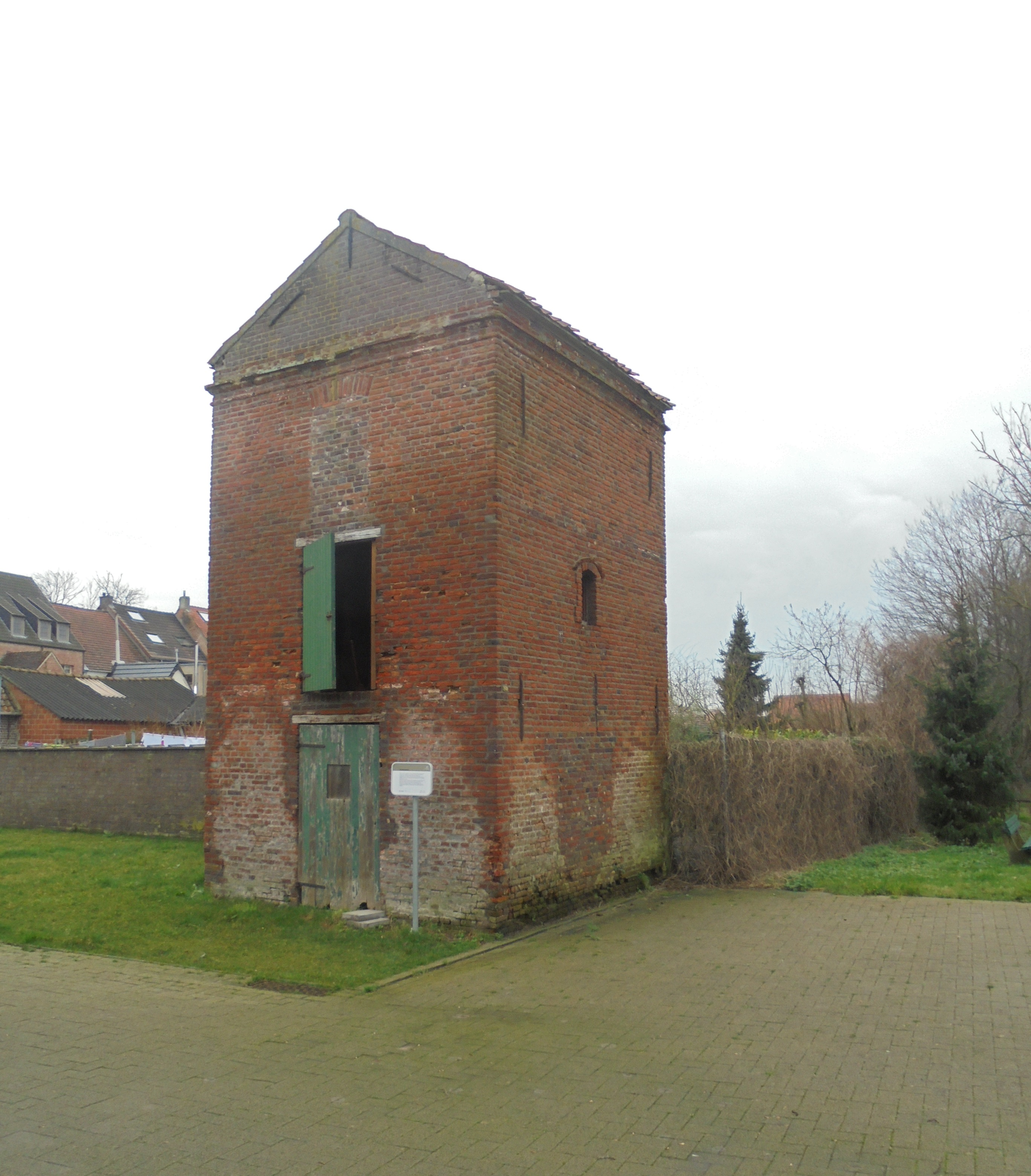 Duiventoren (nabij SOCK) in de Voorstraat - Kaprijke - Oost-Vlaanderen - België